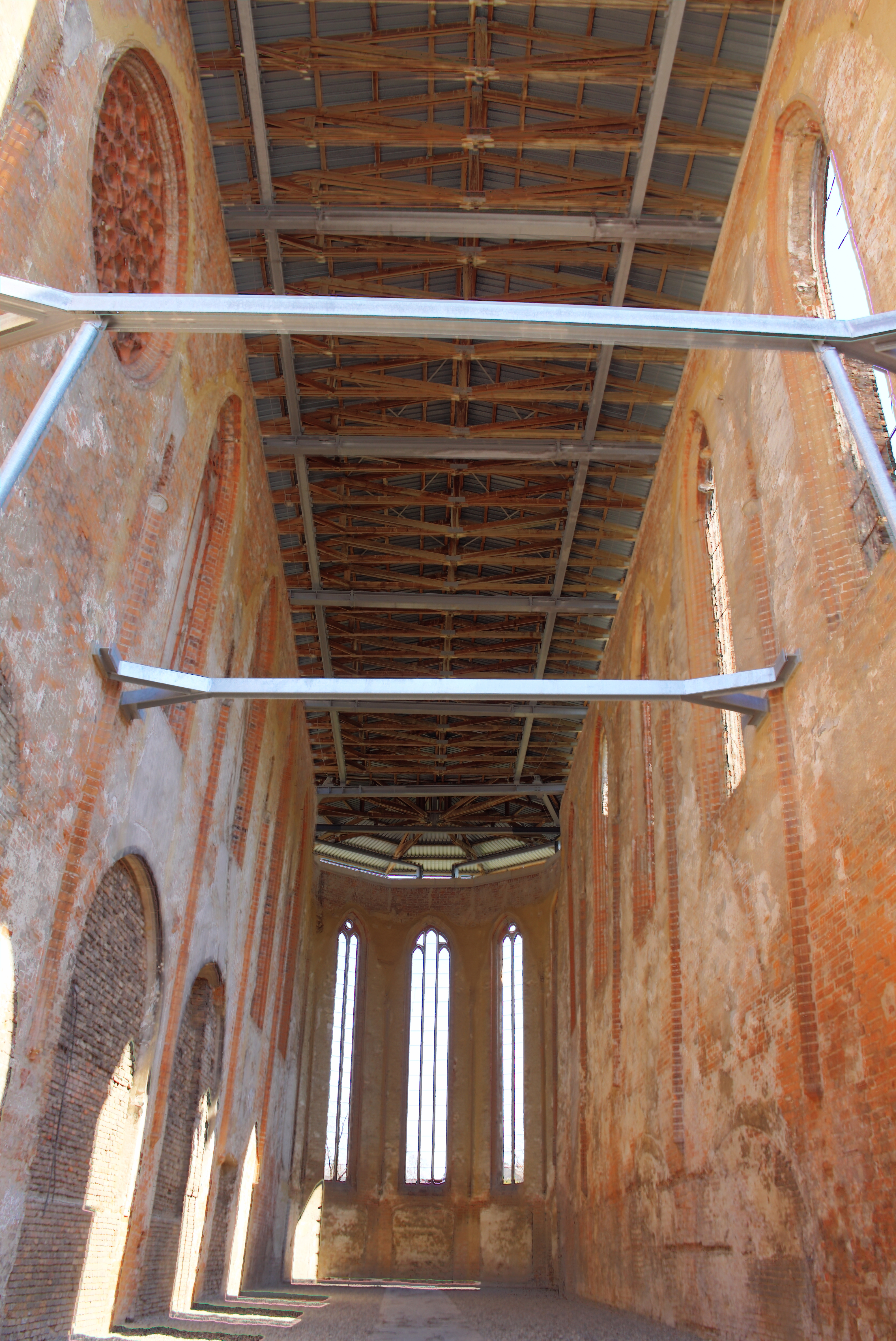 St. Johannis - die Ruine von Westen